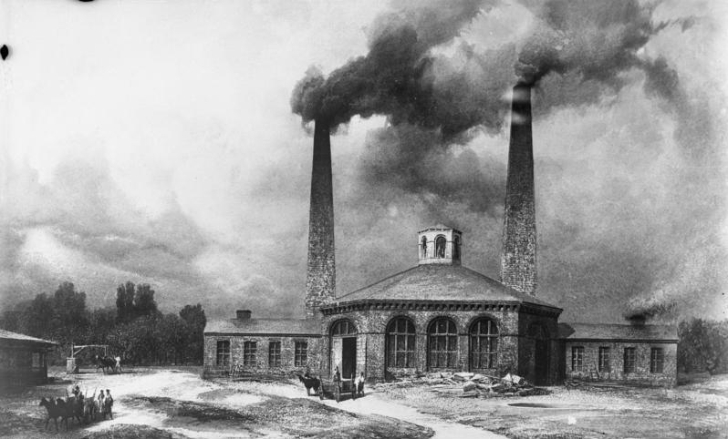 Die weltbekannten Borsigwerke insolvent! und haben ihre Zahlungen einstellen müssen. Aus kleinsten Anfängen heraus hat sich die bekannte Maschinenfabrik zur Weltfirma empor gearbeitet und über 90 Jahre erfolgreich geschaffen. Bekannt war der Borsig-Lokomotivbau. Die erste Werkstätte August Borsigs am Oranienburger Tor in Berlin im Jahre 1837.